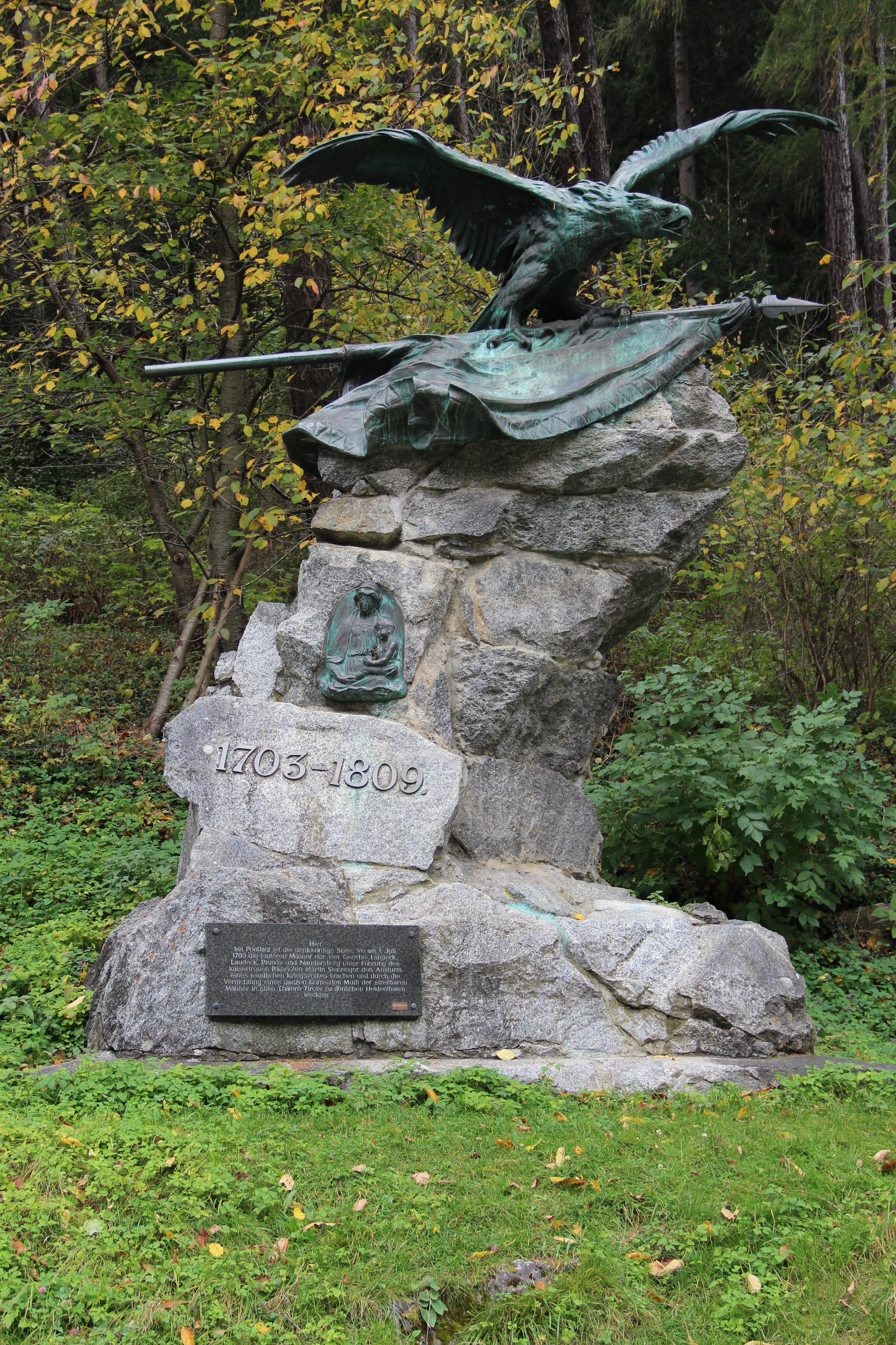 Denkmal bei der Pontlatzbrücke